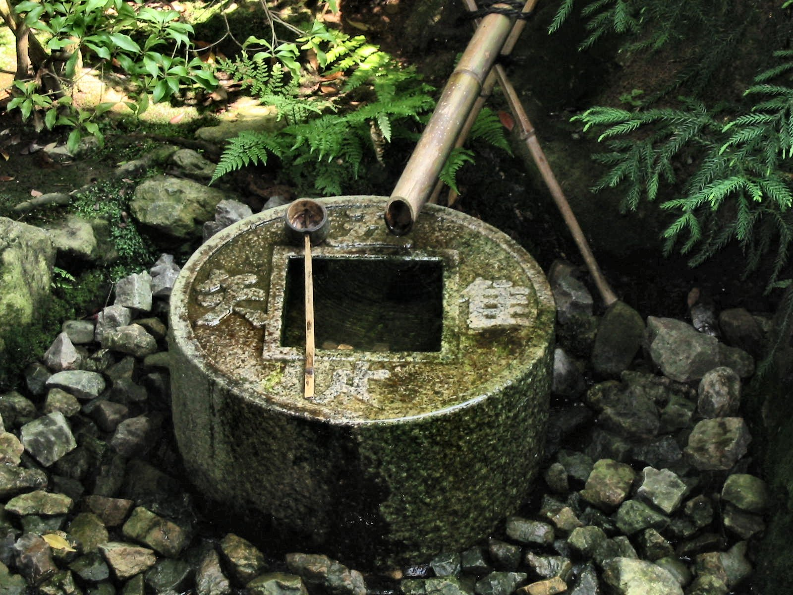 Ryoan-ji, oude stenen waterschaal bij tempel, eigen foto ter beschikking gesteld onder GFDL